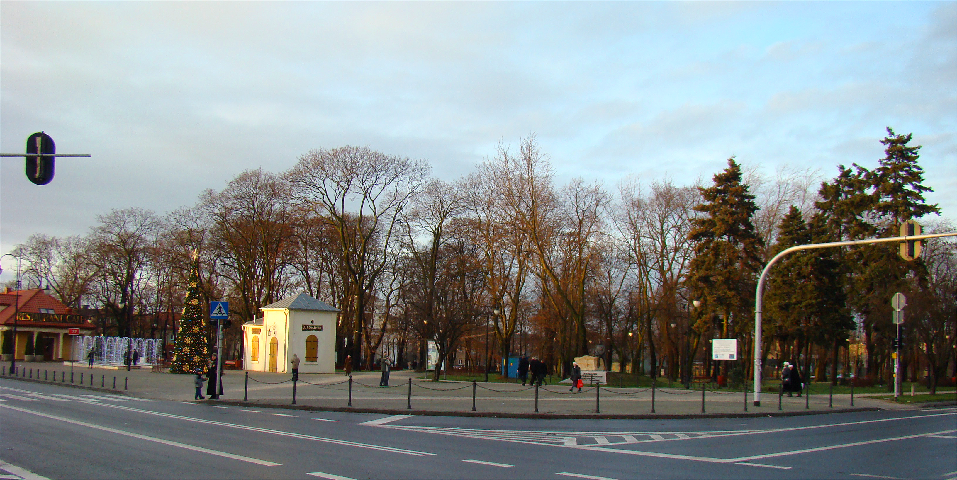 Plac Tadeusza Kościuszki / Park miejski w Aleksandrowie Łódzkim (powiat zgierski, województwo łódzkie), Polska